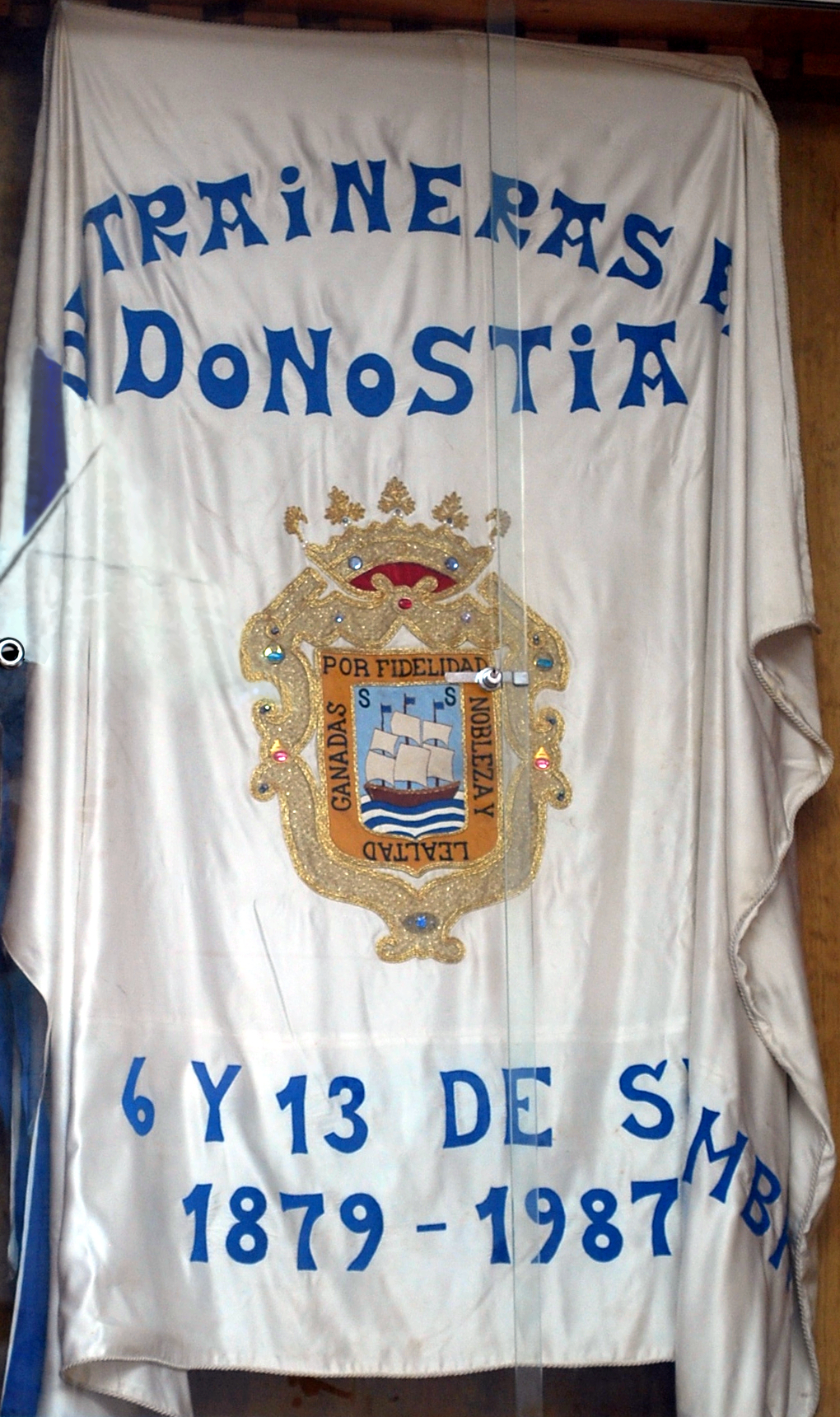 Drapeaux gagnés par Zumaia (Guipuscoa)